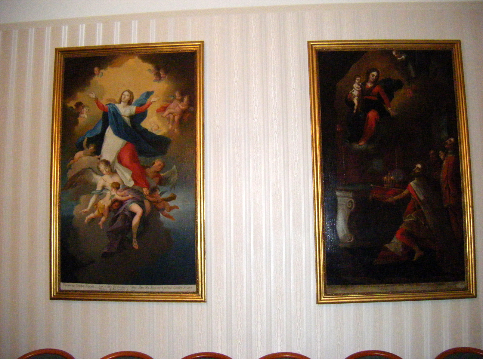 Pázmáneum